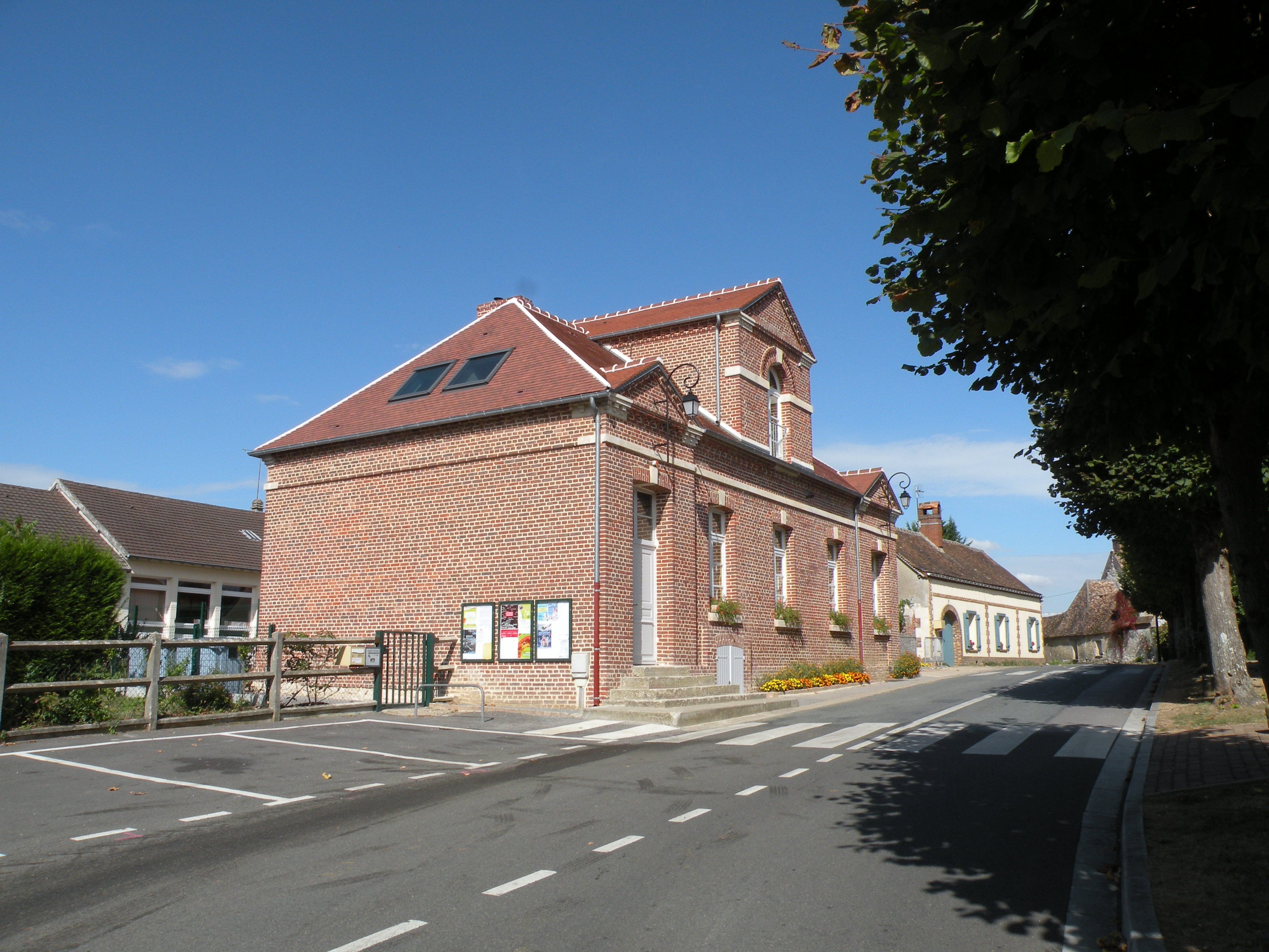 mairie de Le Mont-Saint-Adrien, sans certitude.